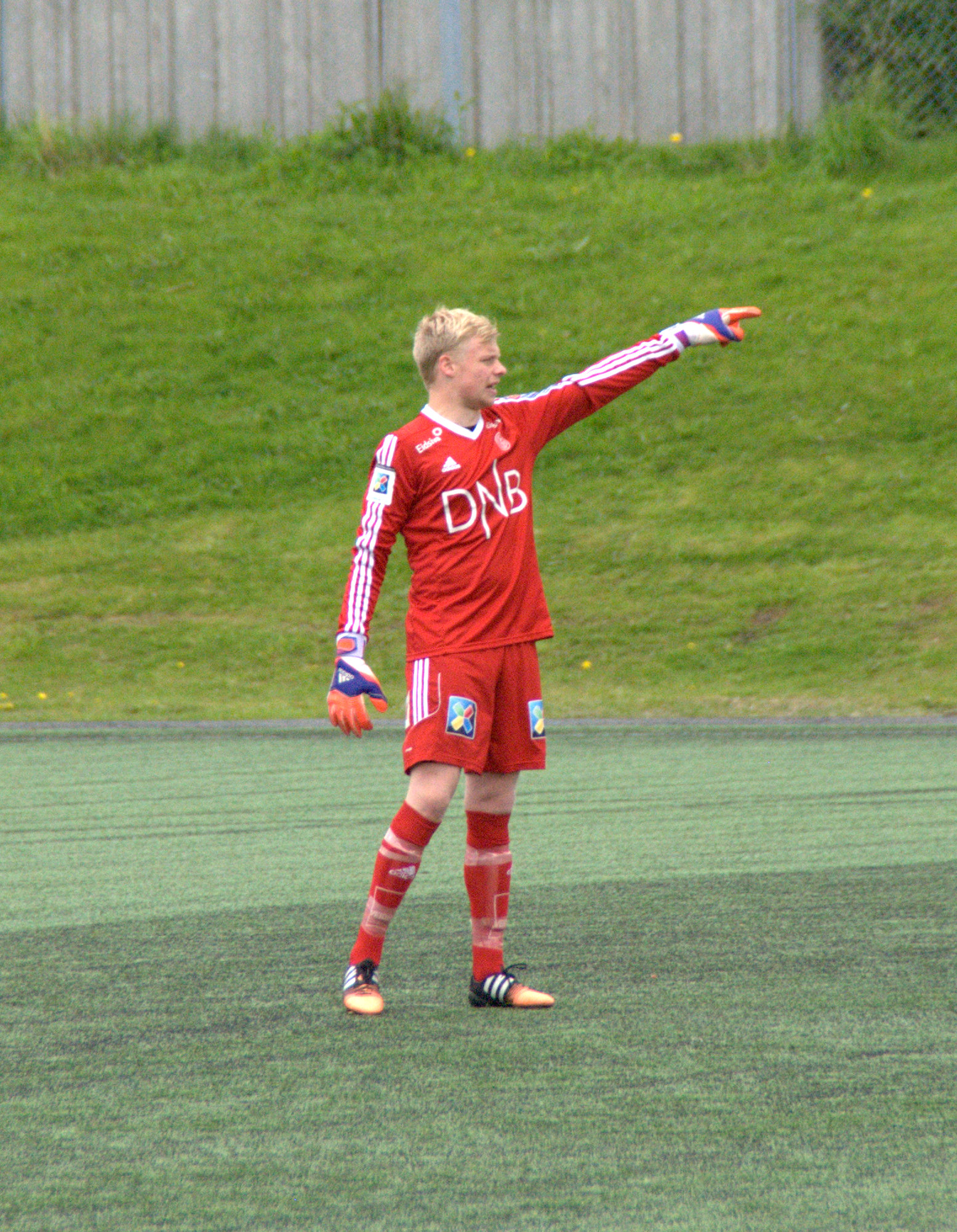 Emil Holst for Hamarkameratene